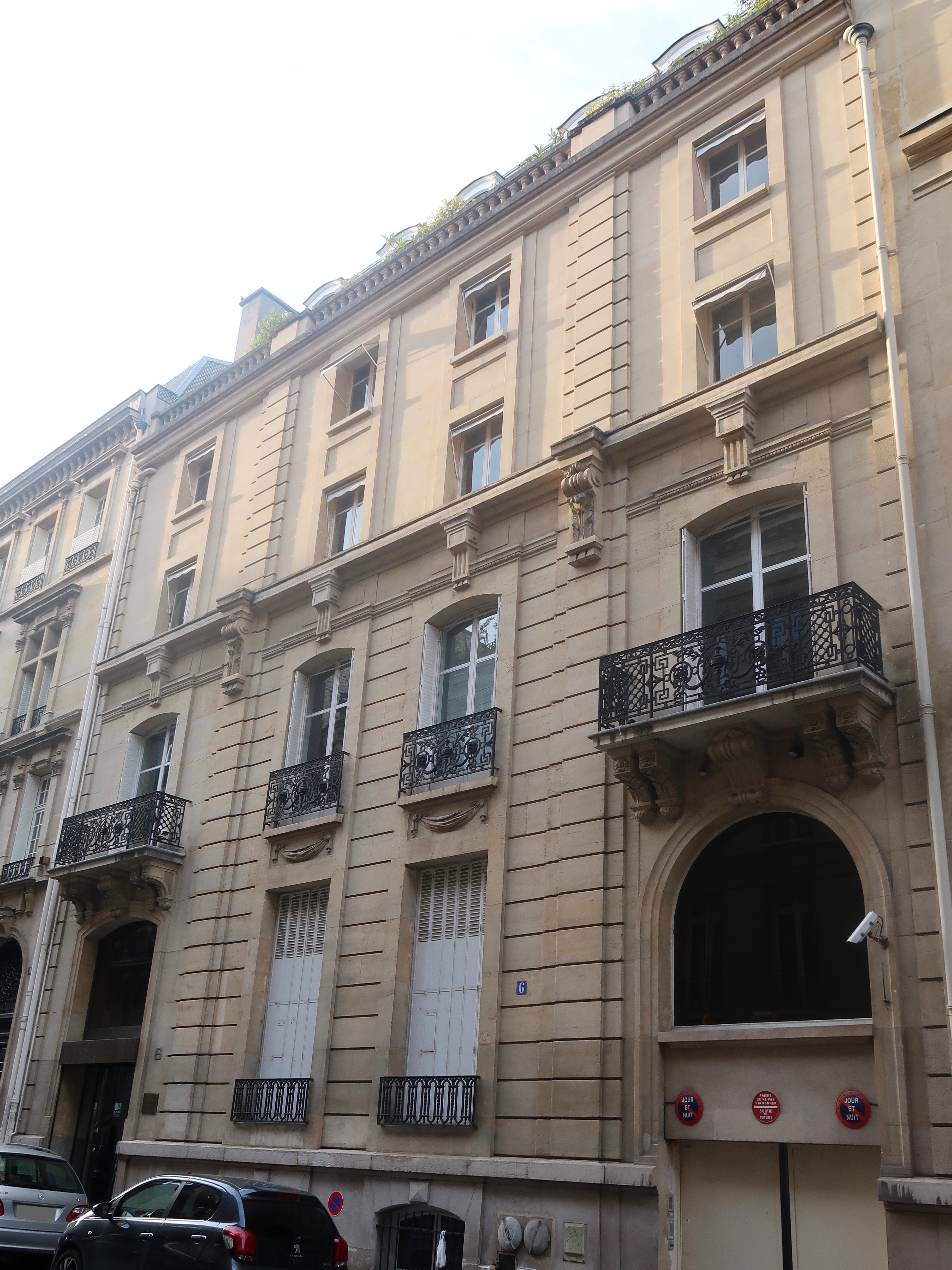 6 rue Délibes (Paris, 16e).